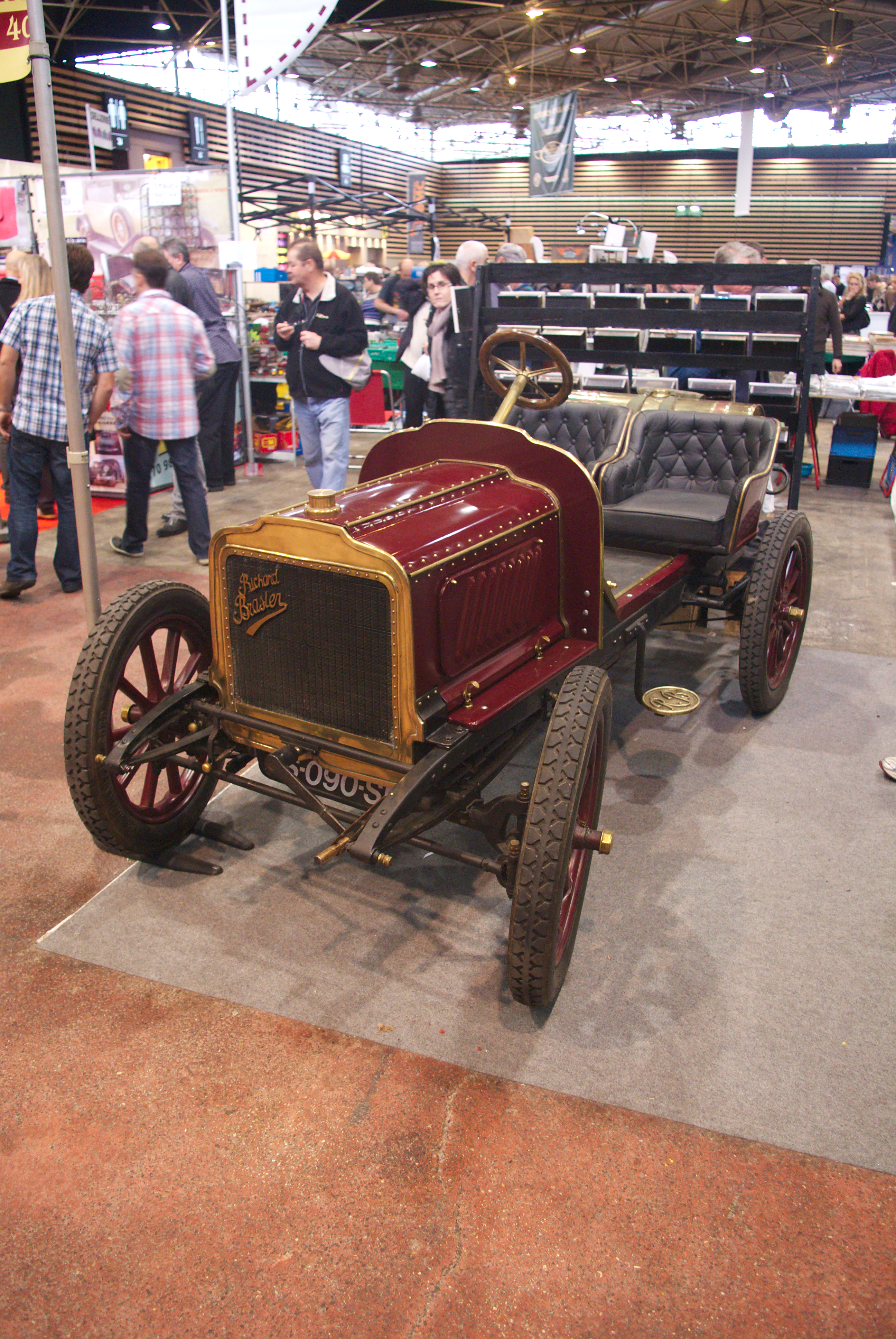 Voiture Richard-Brasier à Epoqu'auto 2012